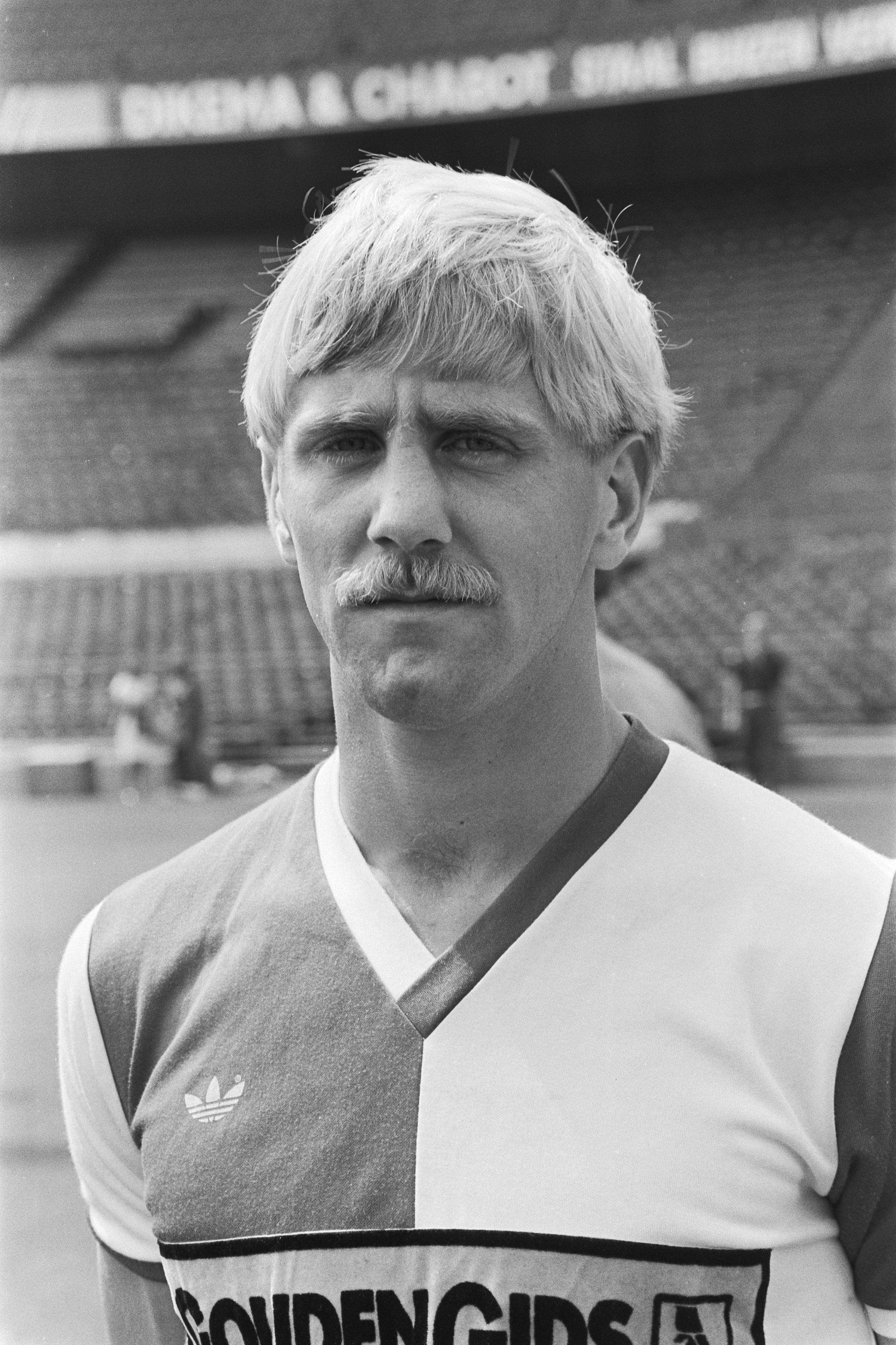 Collectie / Archief : Fotocollectie Anefo Reportage / Serie : [ onbekend ] Beschrijving : Persdag Feijenoord; 3, 4: Ivan Nielsen , kop, 5, 6: Andre Hoekstra , kop Datum : 29 juli 1982 Trefwoorden : sport, voetbal Persoonsnaam : Andre Hoekstra Instellingsnaam : Feyenoord Fotograaf : Dijk, Hans van / Anefo Auteursrechthebbende : Nationaal Archief Materiaalsoort : Negatief (zwart/wit) Nummer archiefinventaris : bekijk toegang 2.24.01.05 Bestanddeelnummer : 932-2605